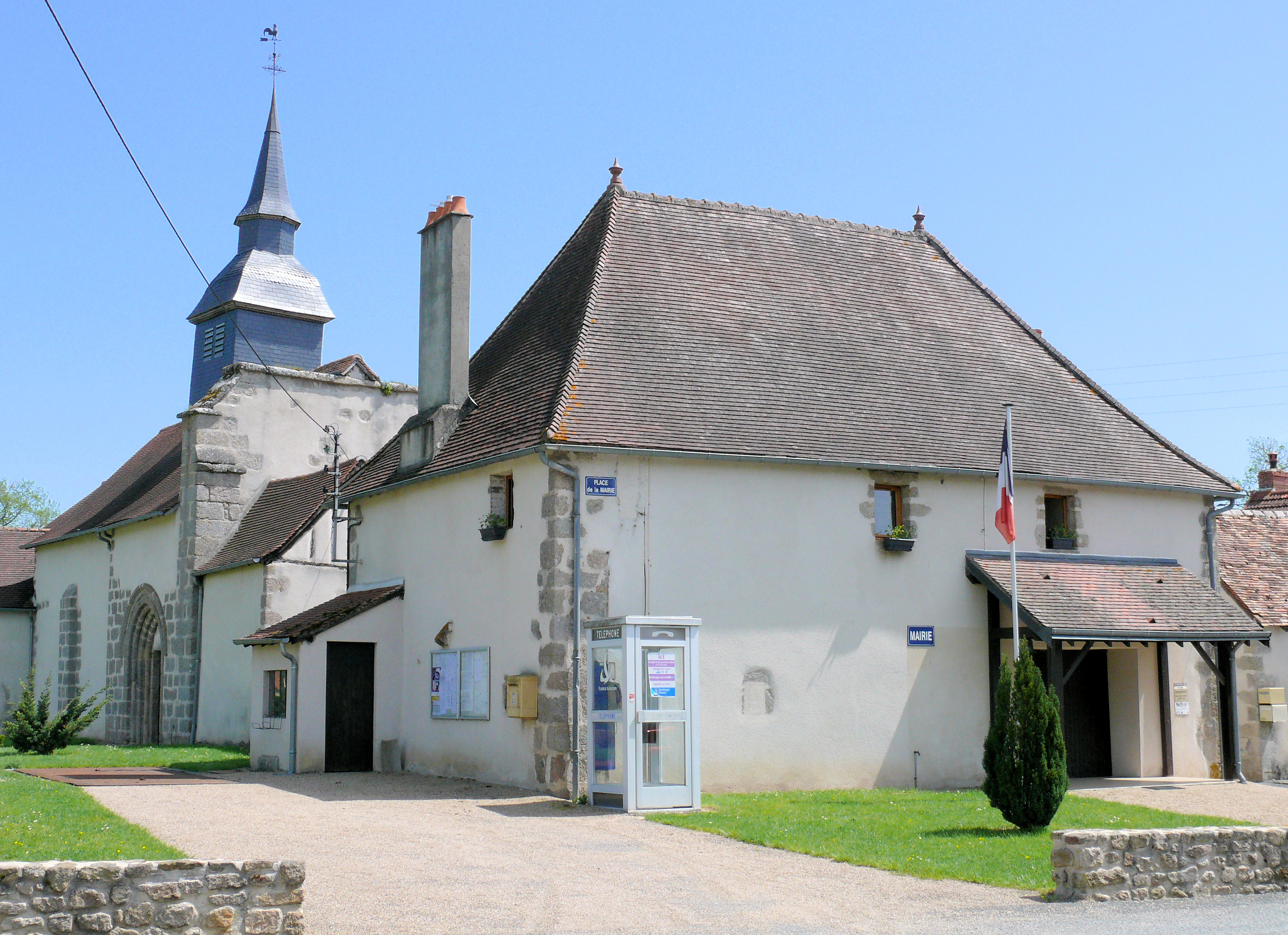 La Celle-sous-Gouzon - La Mairie et le prieuré